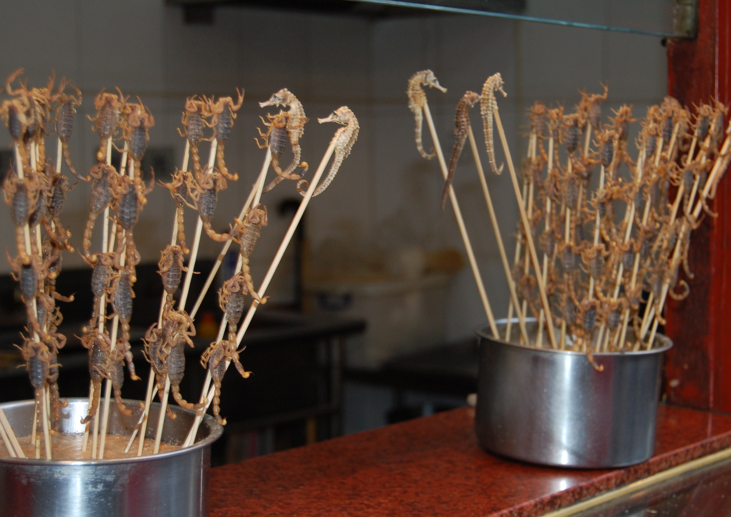 Frittierte Seepferdchen und Skorpione - eine Delikatesse der chinesischen Küche